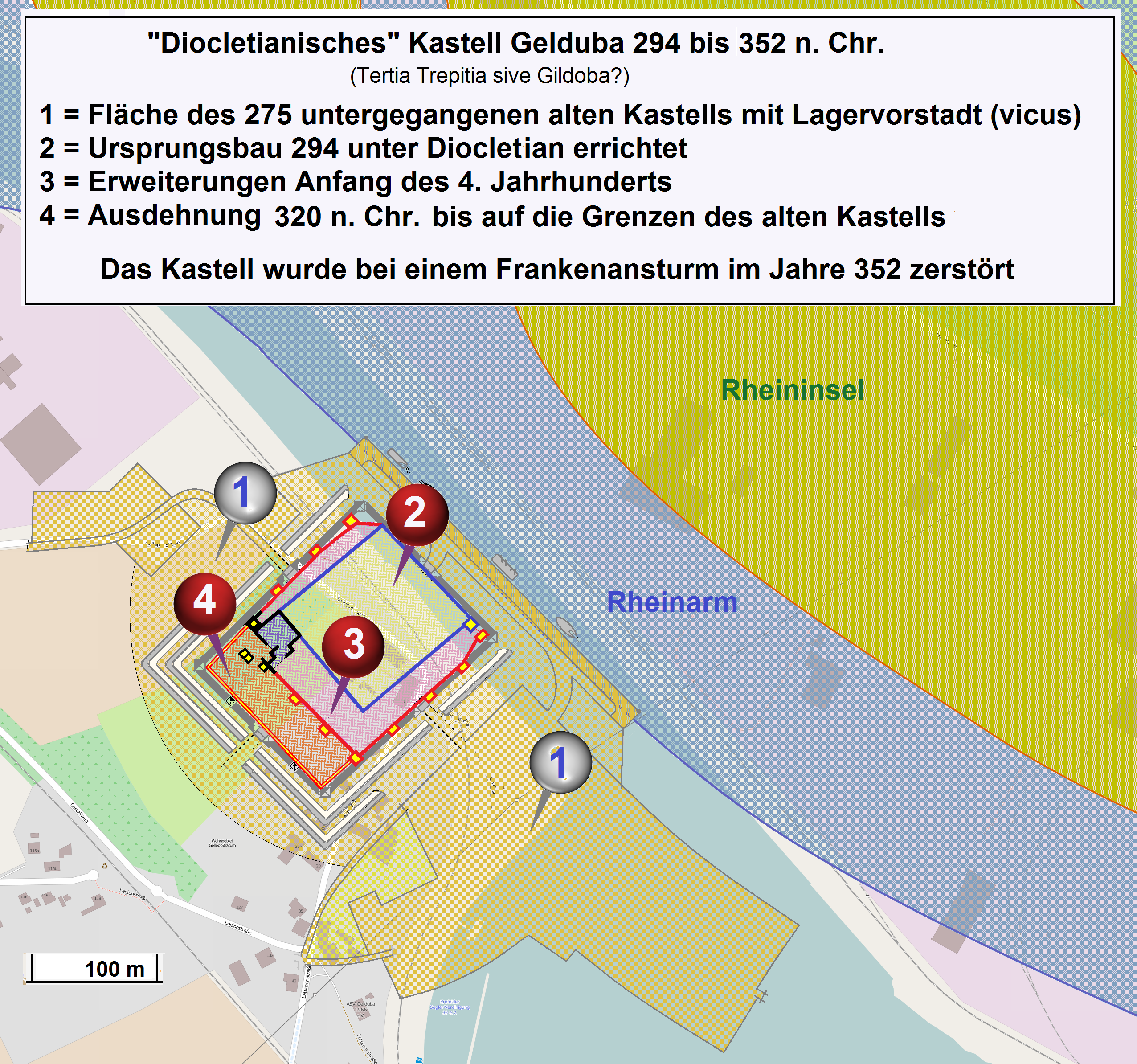 Gelduba Kastell um 294 n. Chr. This map of Krefeld-Gellep Gelduba Kastell um 294 n. Chr. was created from OpenStreetMap project data, collected by the community. This map may be incomplete, and may contain errors. Don't rely solely on it for navigation.